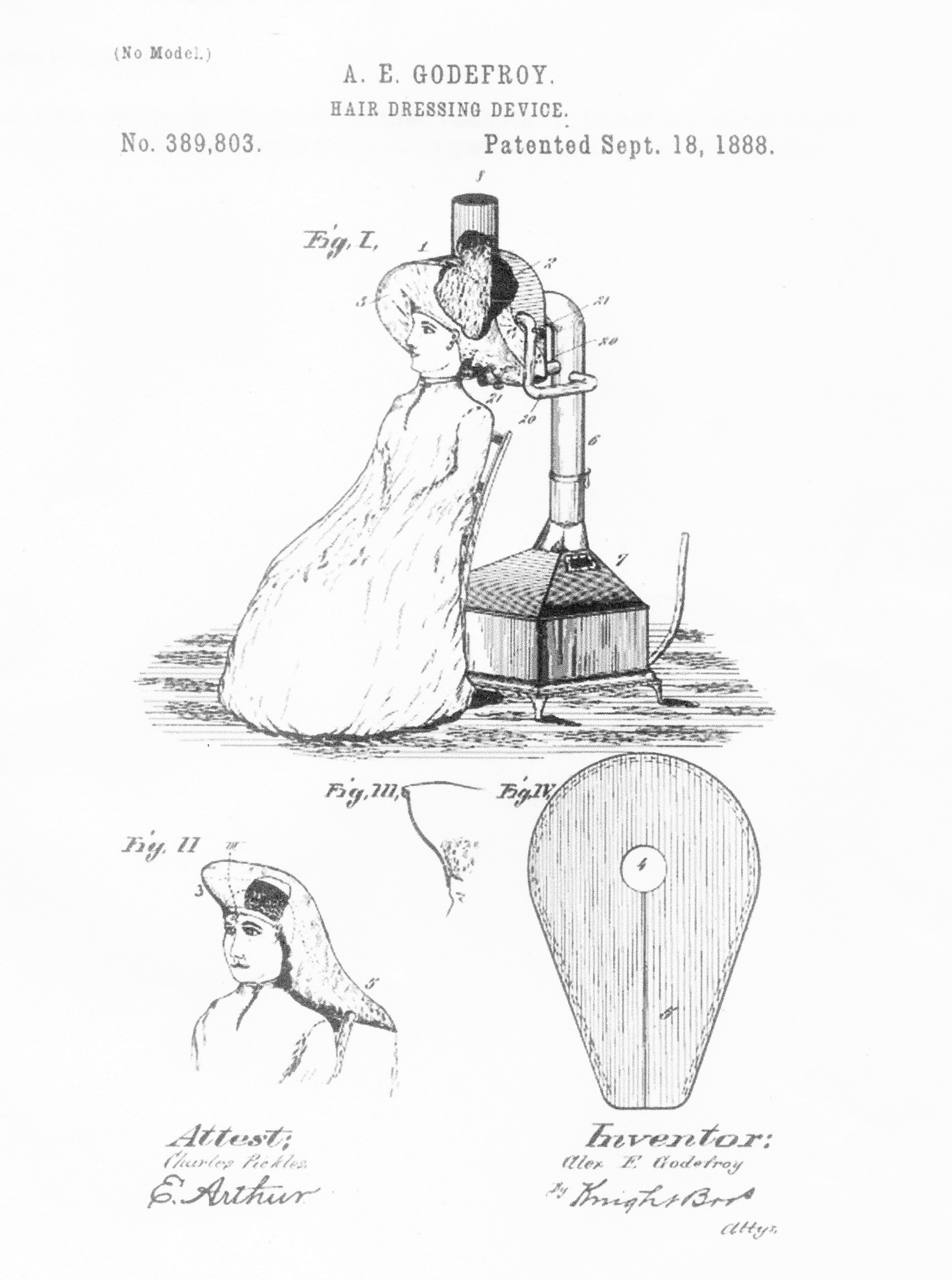 Brevet d'Alexandre Ferdinand Godefroy 1888, représentant le premier séchoir à cheveux est le premier lave tête.